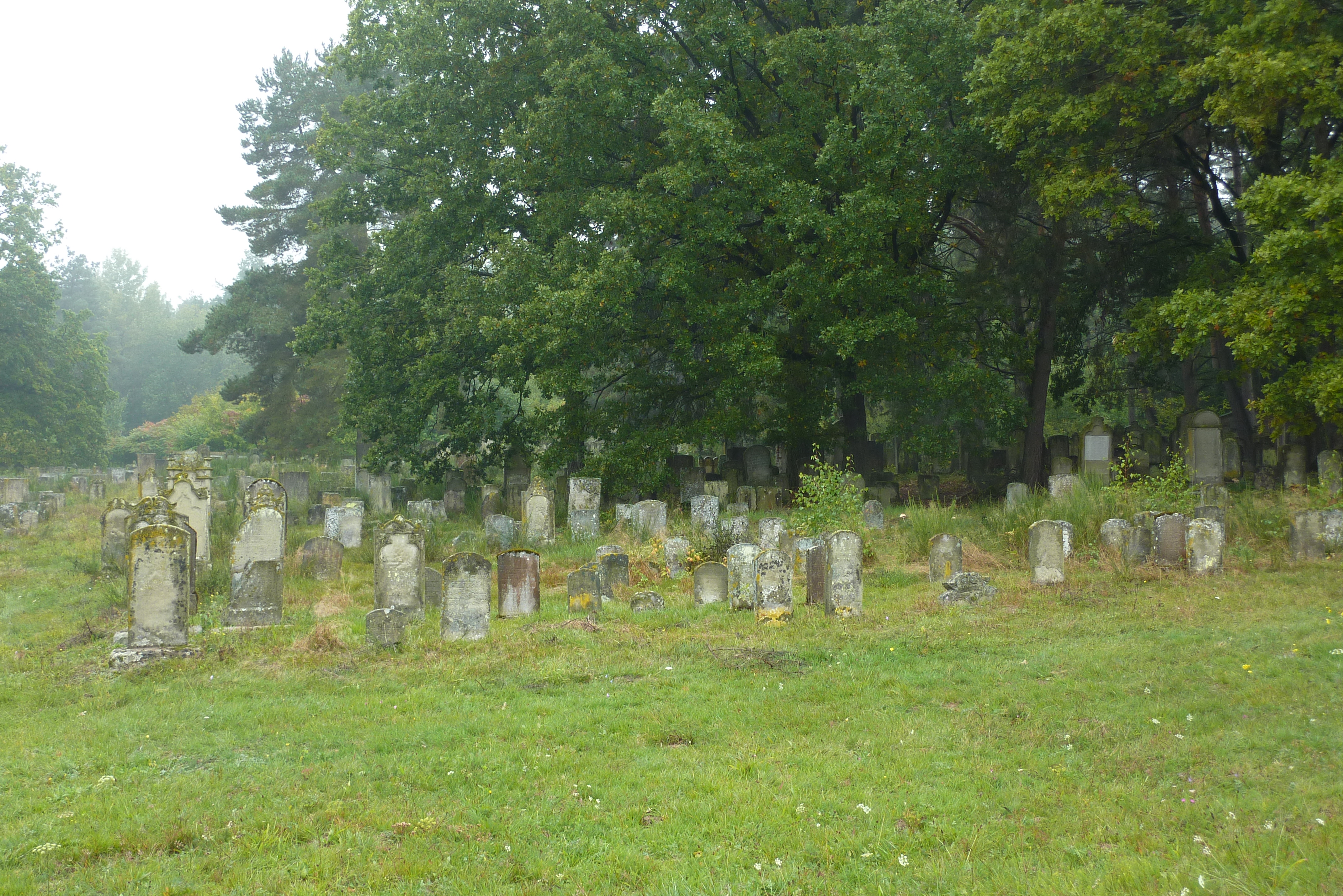 Jüdischer Friedhof in Bechhofen im Landkreis Ansbach (Bayern)